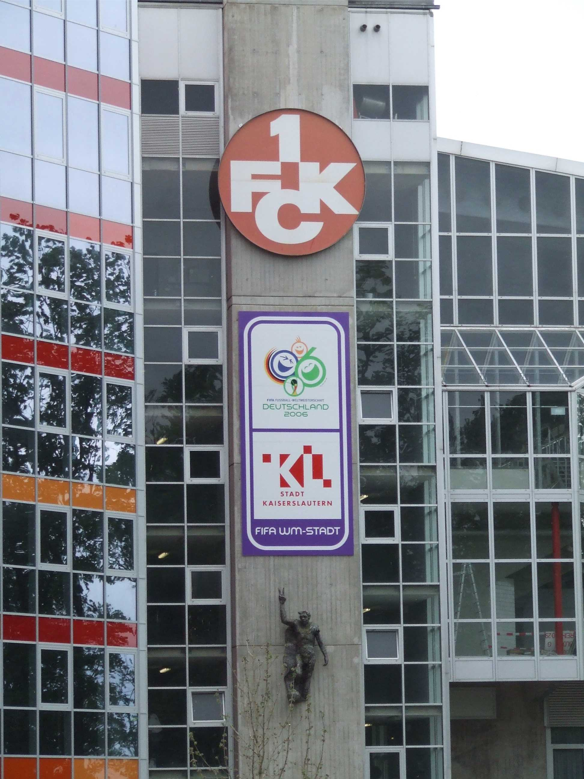 Fritz-Walter-Stadion in Kaiserslautern. Oben: 1. FCK-Logo, Mitte: Logo zur FIFA WM 2006, Unten: "Der Teufel vom Betzenberg"